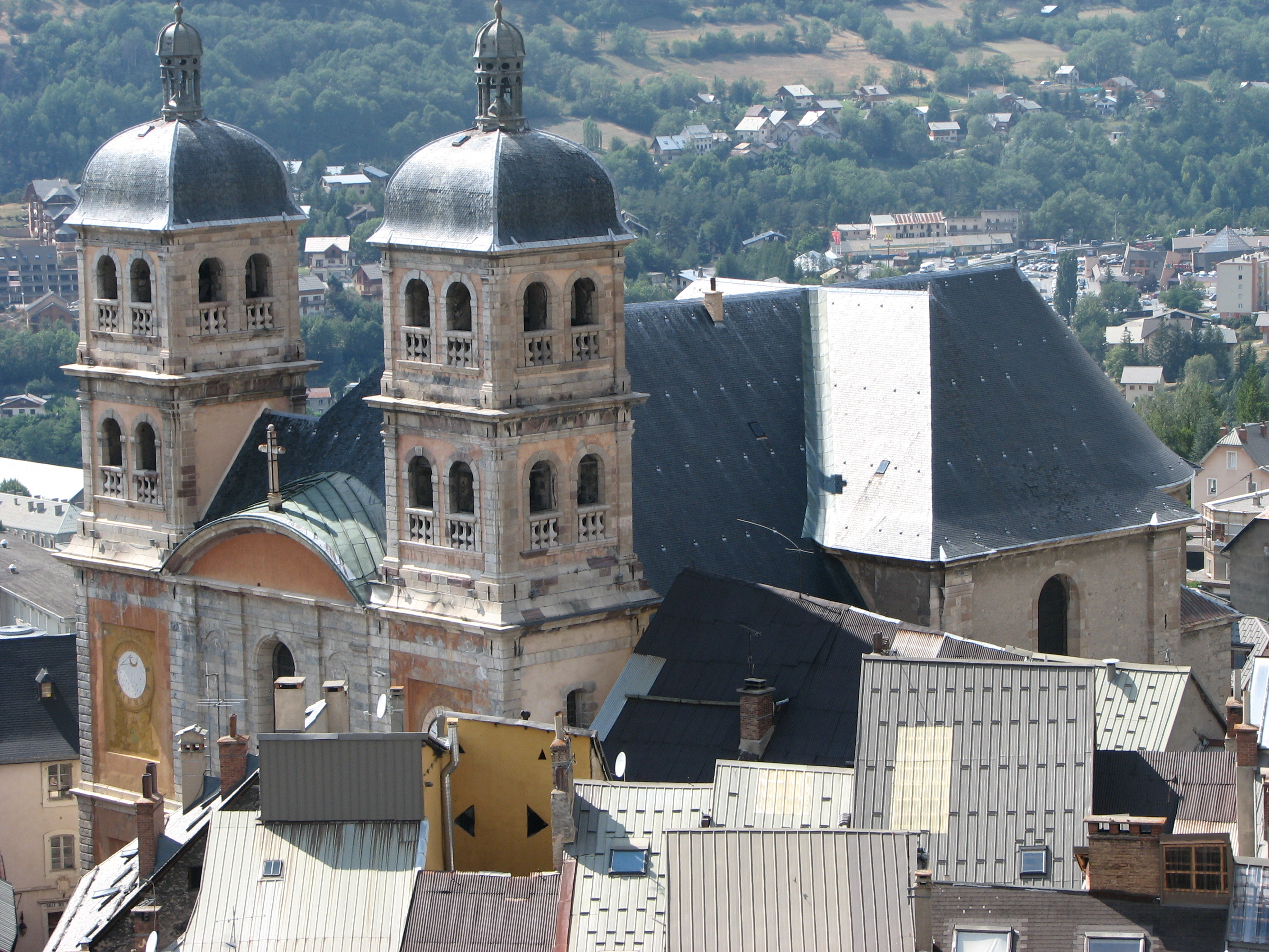 Collégiale Notre-Dame, Briançon